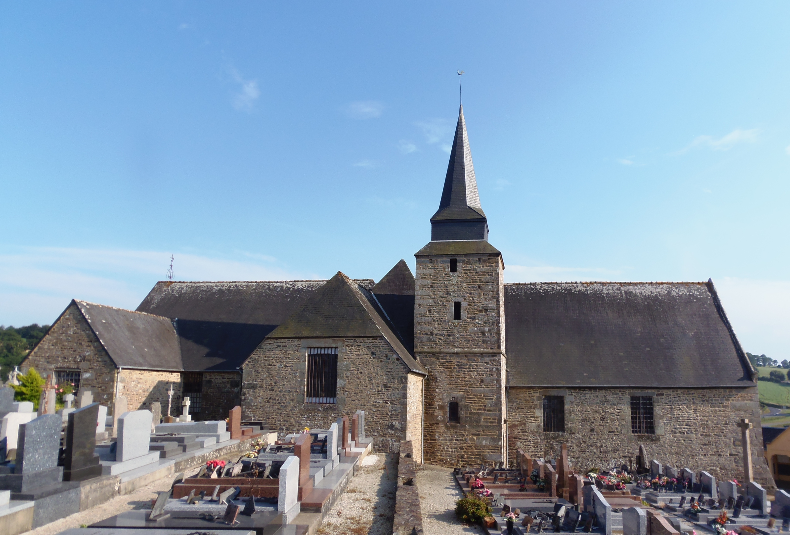 Tinchebray (Normandie, France). L'église Notre-Dame des Montiers (classée). .